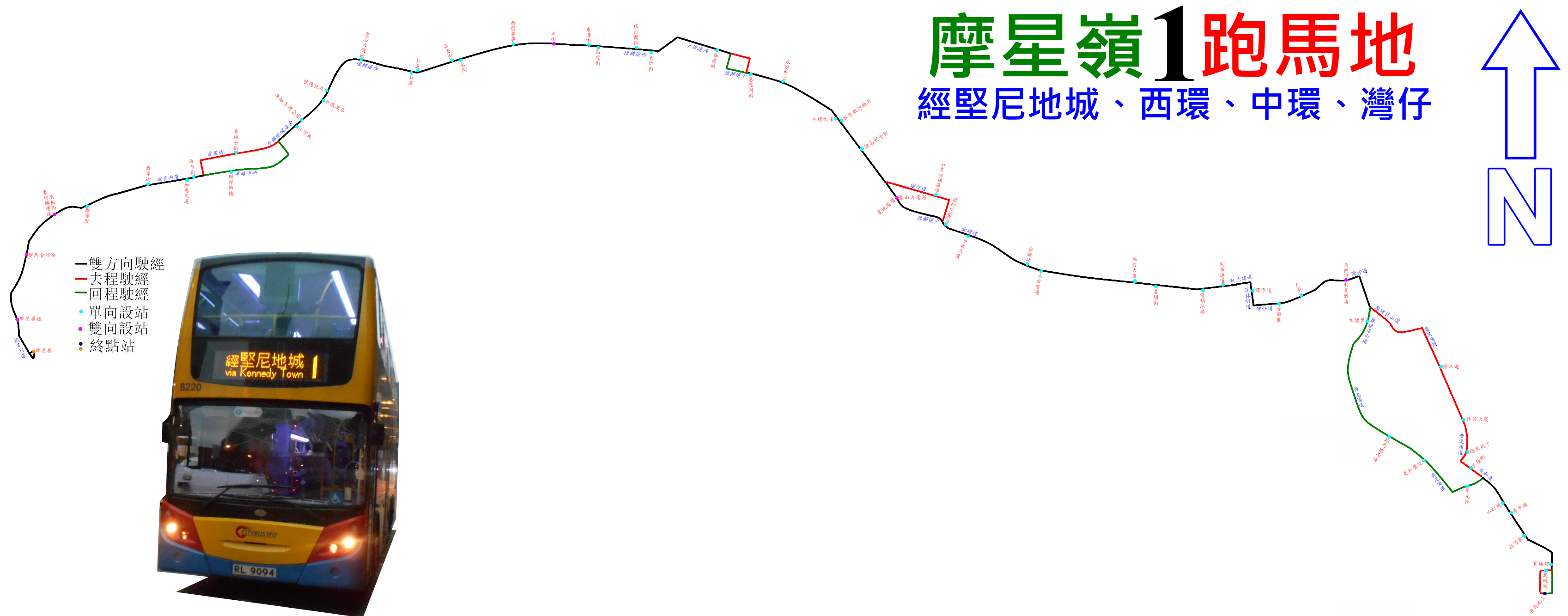 中文（香港）: 城巴1號線的走線圖